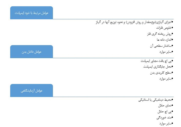 عوامل موثر بر خوردگی منیزیم